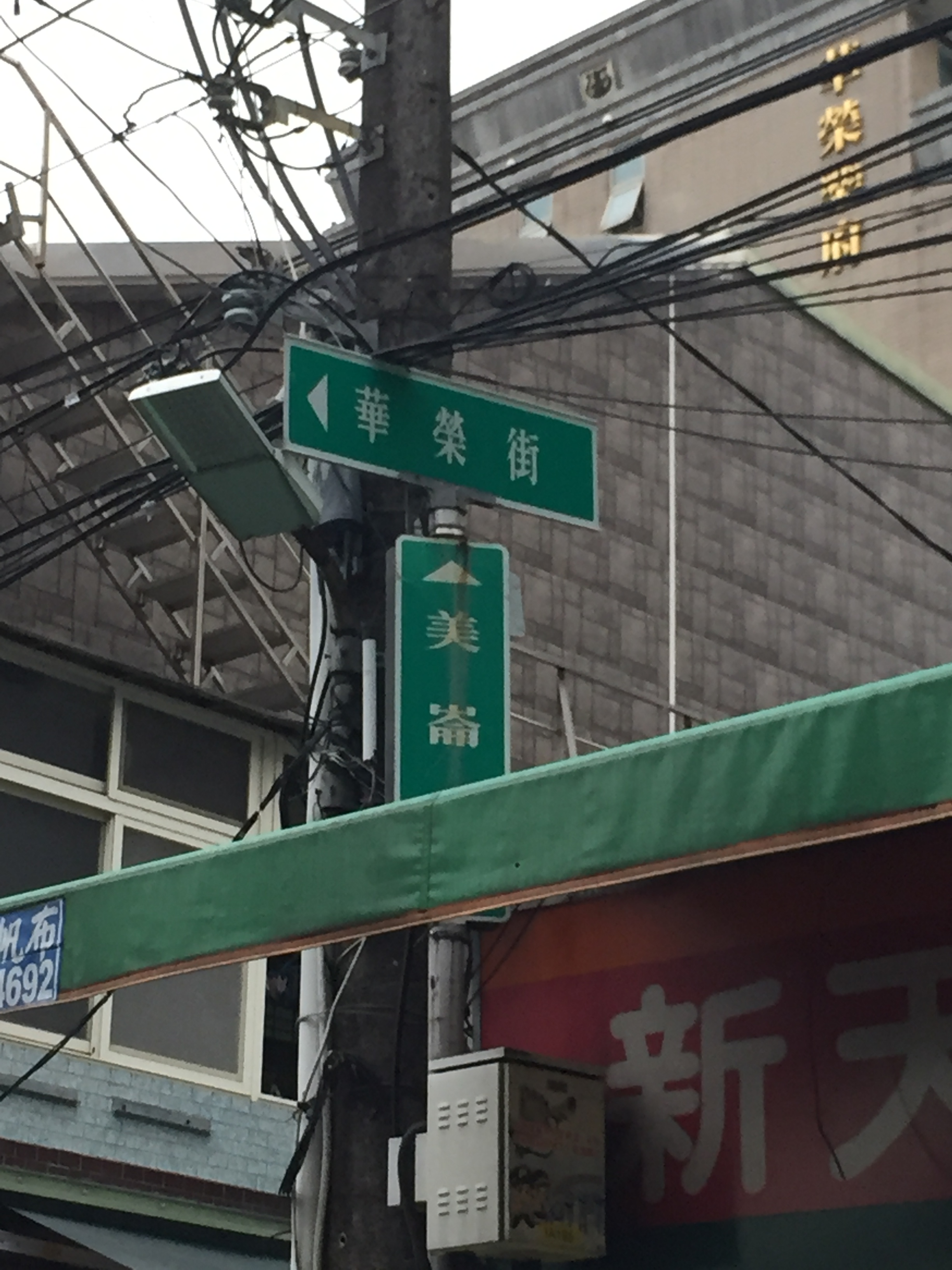 中文（台灣）: 台北市士林區華榮街舊式路牌 2020年攝